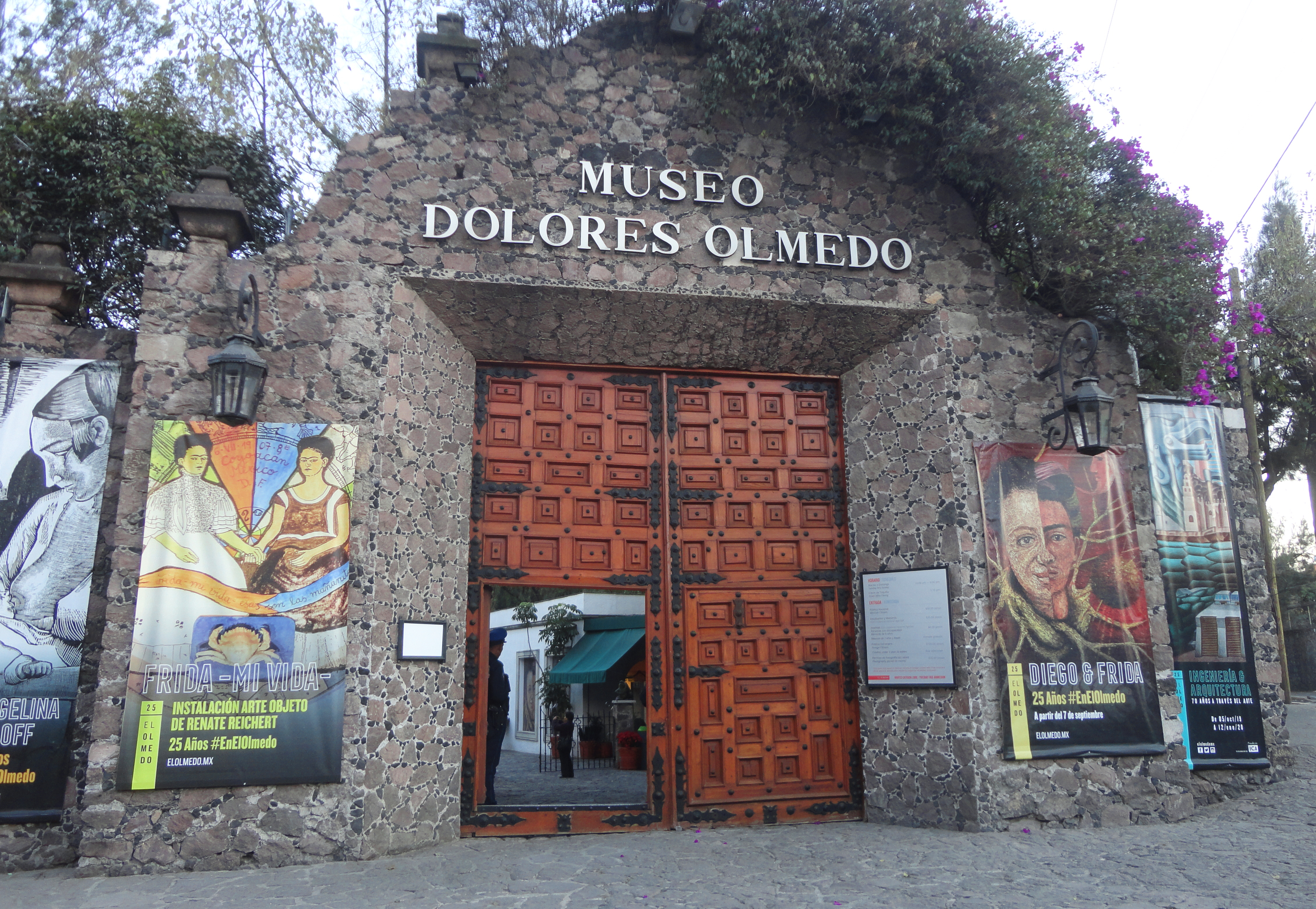 Museo Dolores Olmedo, Xochimilco, Ciudad de México, México.